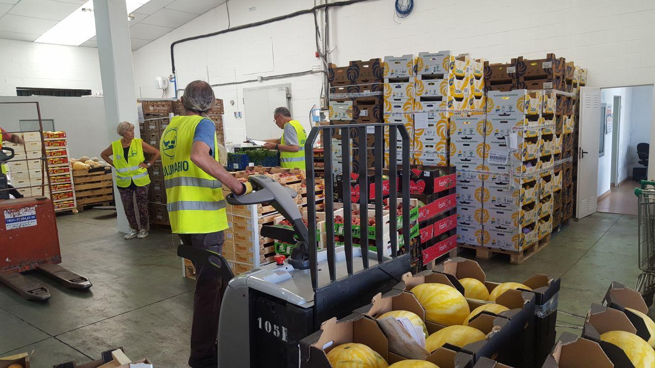 Mañana, sábado 15 de diciembre, desde las 10:00 y hasta las 14:00 horas, los mercados municipales de Las Ventas, Las Águilas, Villa de Vallecas, Barceló, Santa María de la Cabeza, San Antón, La Paz y Chamartín, se unen al “Kilo Solidario”, de recogida de comida destinada al Banco de Alimentos.